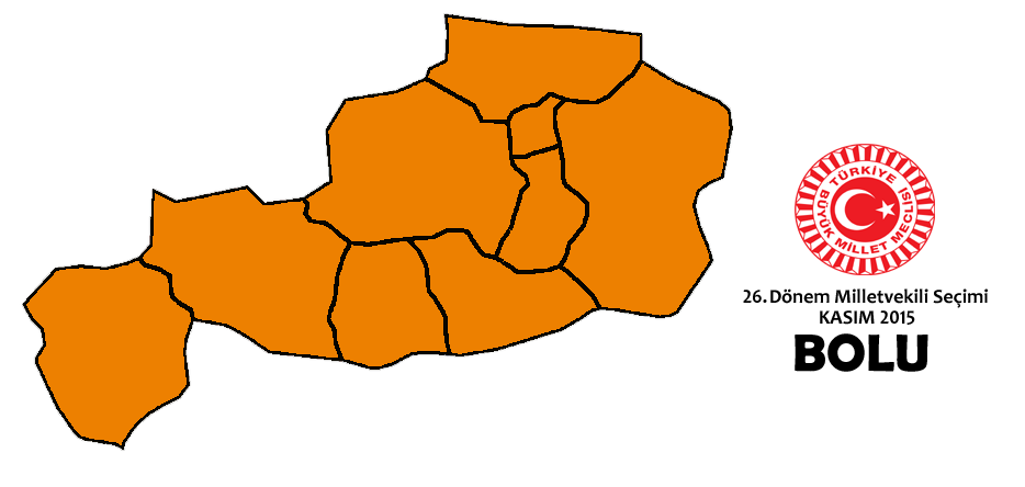 Kasım 2015 seçimleri